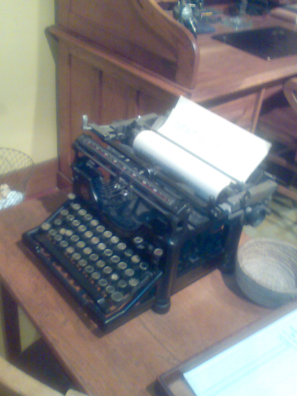 Maquina de escribir. Museo de la Técnica de Terrassa